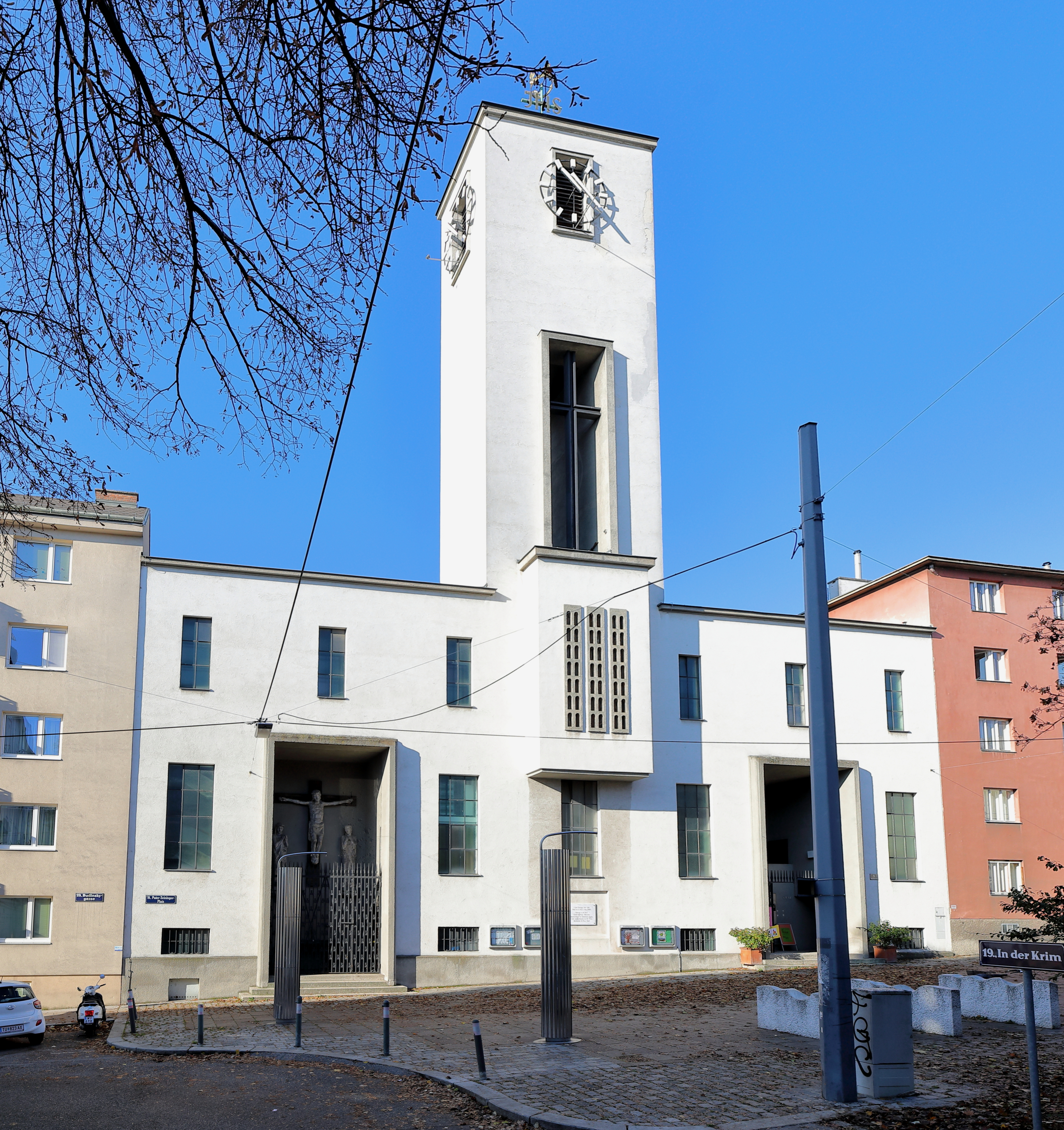 Südostansicht der röm.-kath. Pfarrkirche hl. Judas Thaddäus, auch Krimkirche bezeichnet, im 19. Wiener Bezirk Döbling.Die Kirche wurde von 1931 bis 1932 nach Plänen des Architekten Clemens Holzmeister errichtet. In den Jahren 1955 bis 1957 wurde die Kirche westseitg nach den Plänen des Architekten Anton Steflicek um das heutige Hauptschiff und Chor erweitert. Das ursprüngliche Kirchengebäude mit den Kirchturm wurde dadurch zum Querschiff mit einem Nebenaltar bzw. Seitenkapelle.